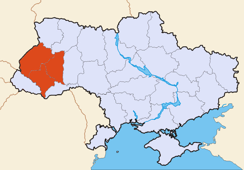 Position de la Galicie en Ukraine